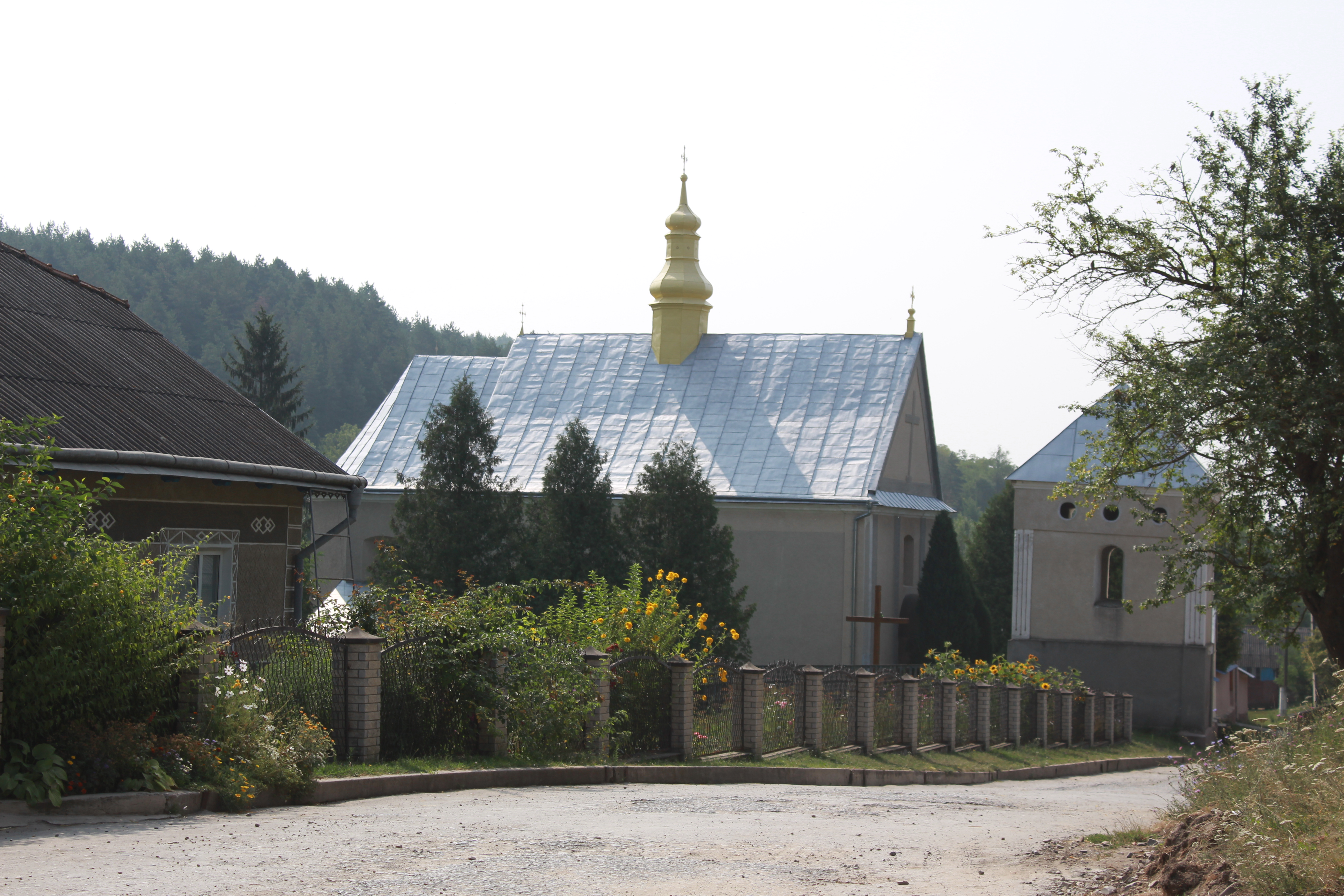 Церква Успіння (мур.), село Угриньківці